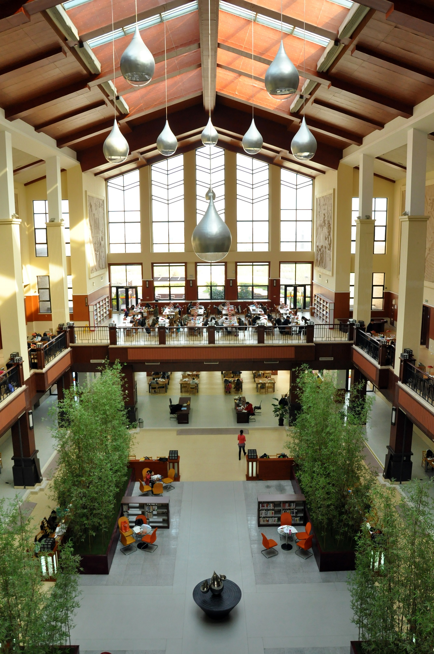 上海政法学院图书馆内景